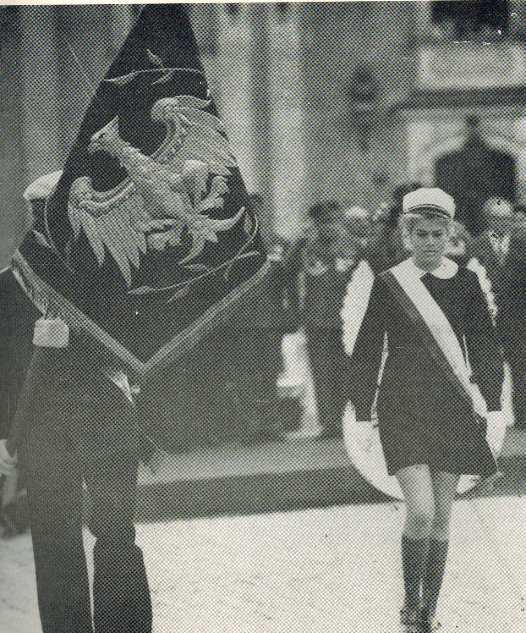 Sztandar AMB